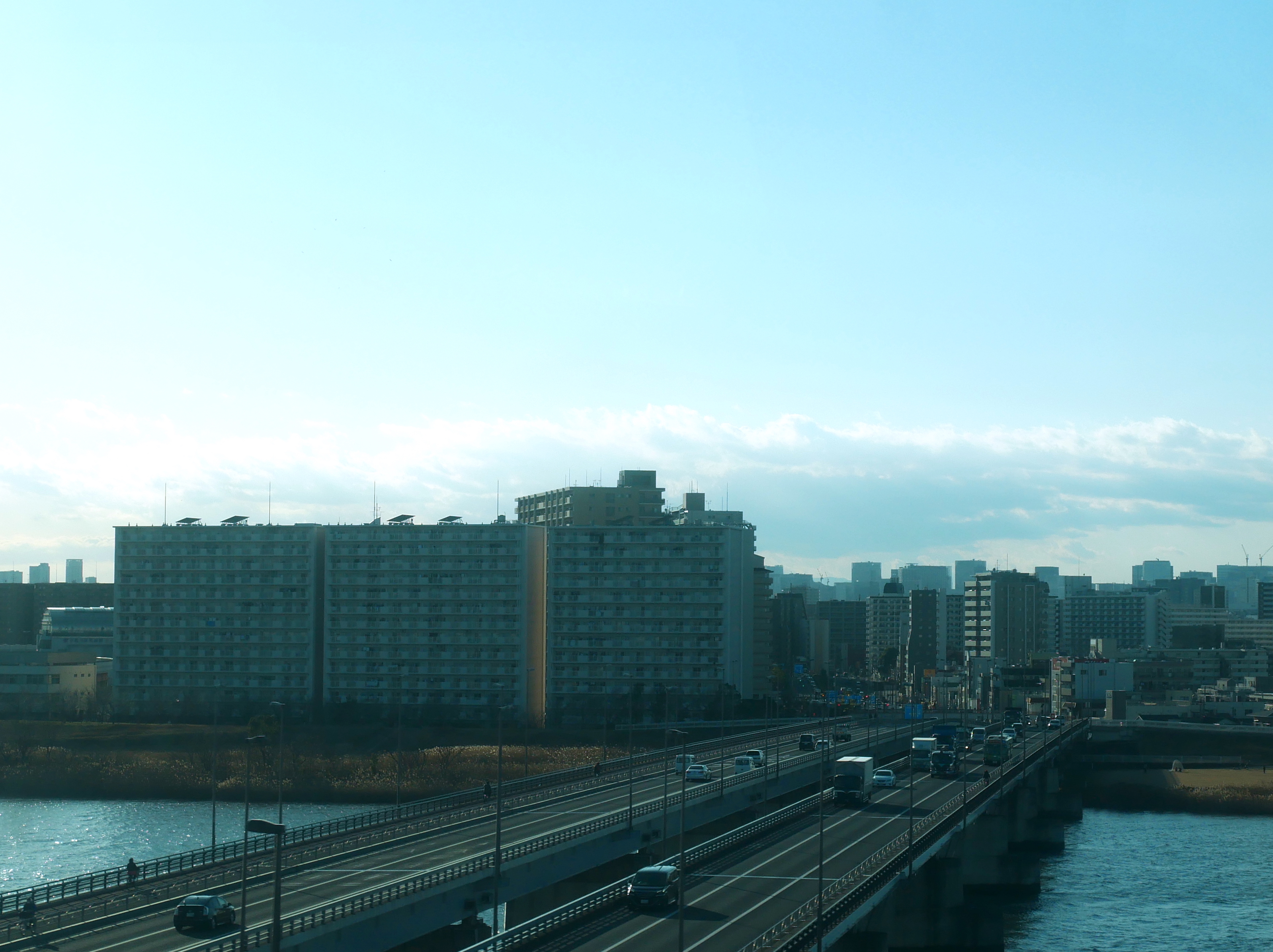 小松川橋 (Komatsugawa bridges) Panasonic Lumix DMC-GX7 Mark II